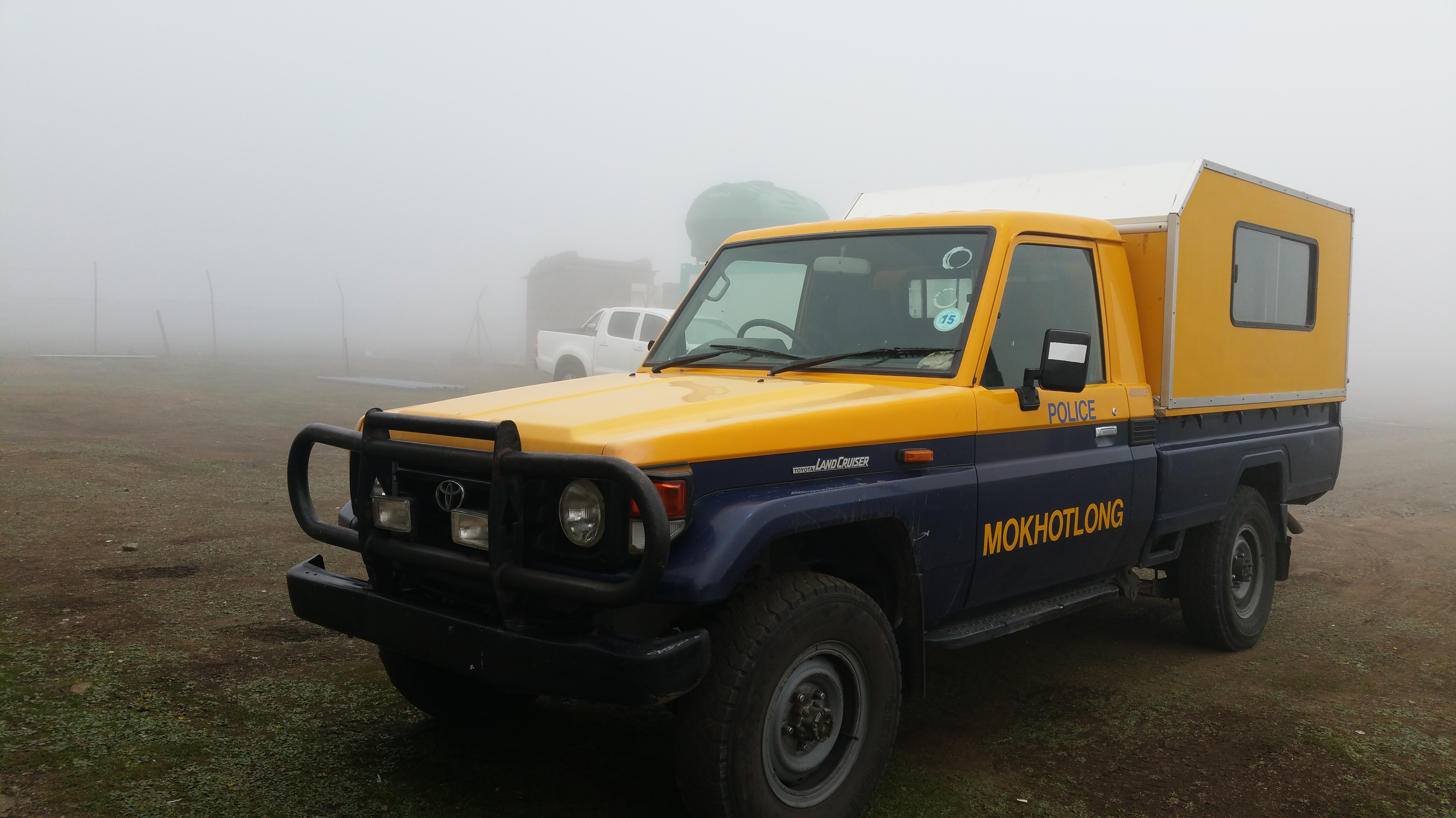 Politieauto van Lesotho bij de Sani Pass